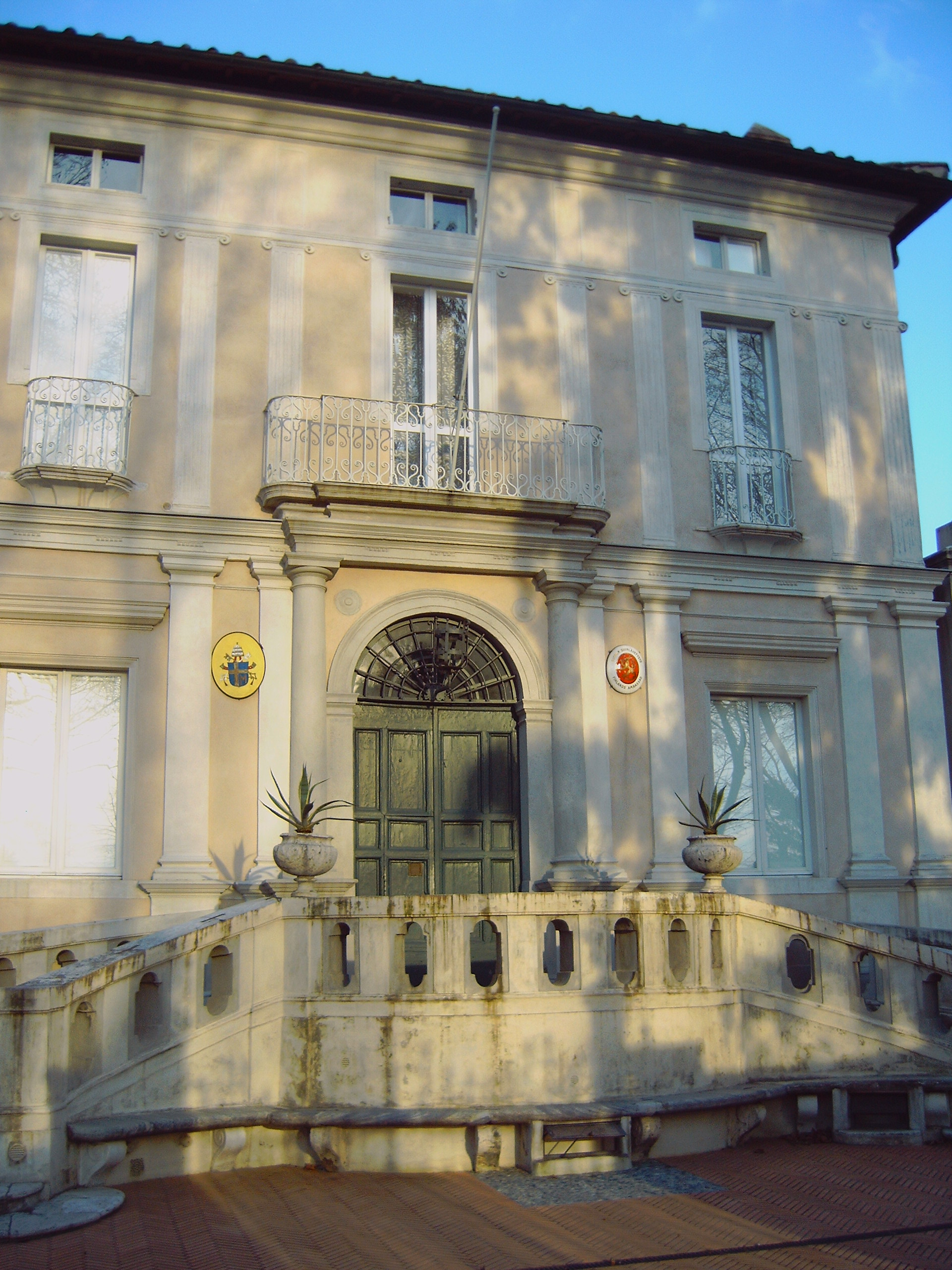 Villa Lante al Gianicolo, Rome, Italy